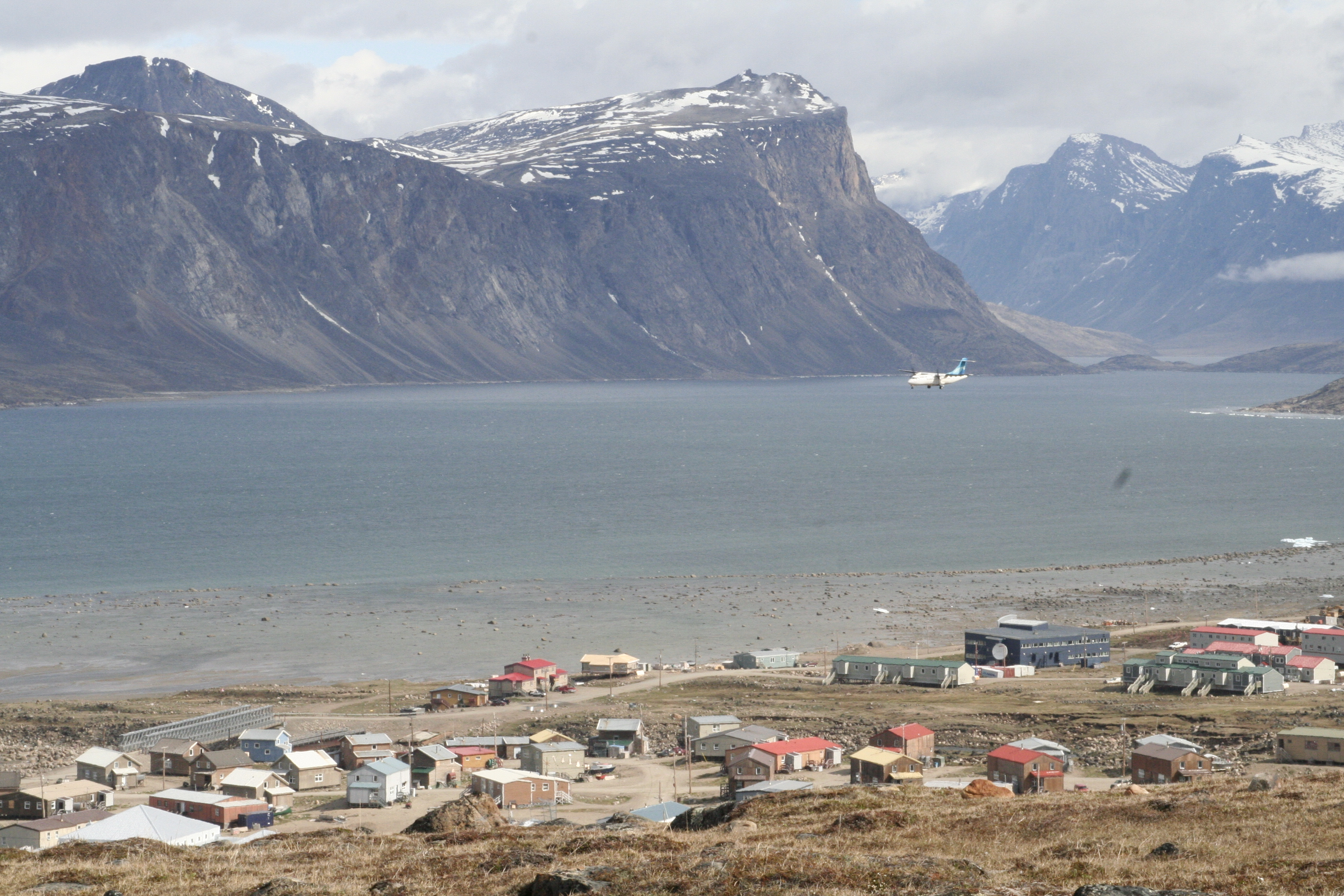 Plane buzzes Pangnirtung.